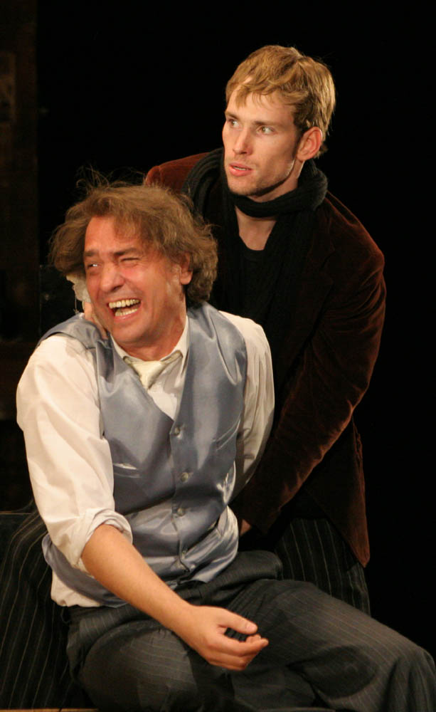 Сцена из спектакля Саратовского академического театра драмы «Лучшие дни нашей жизни» по пьесе Сарояна. Актёры Игорь Баголей, Сергей Захарин